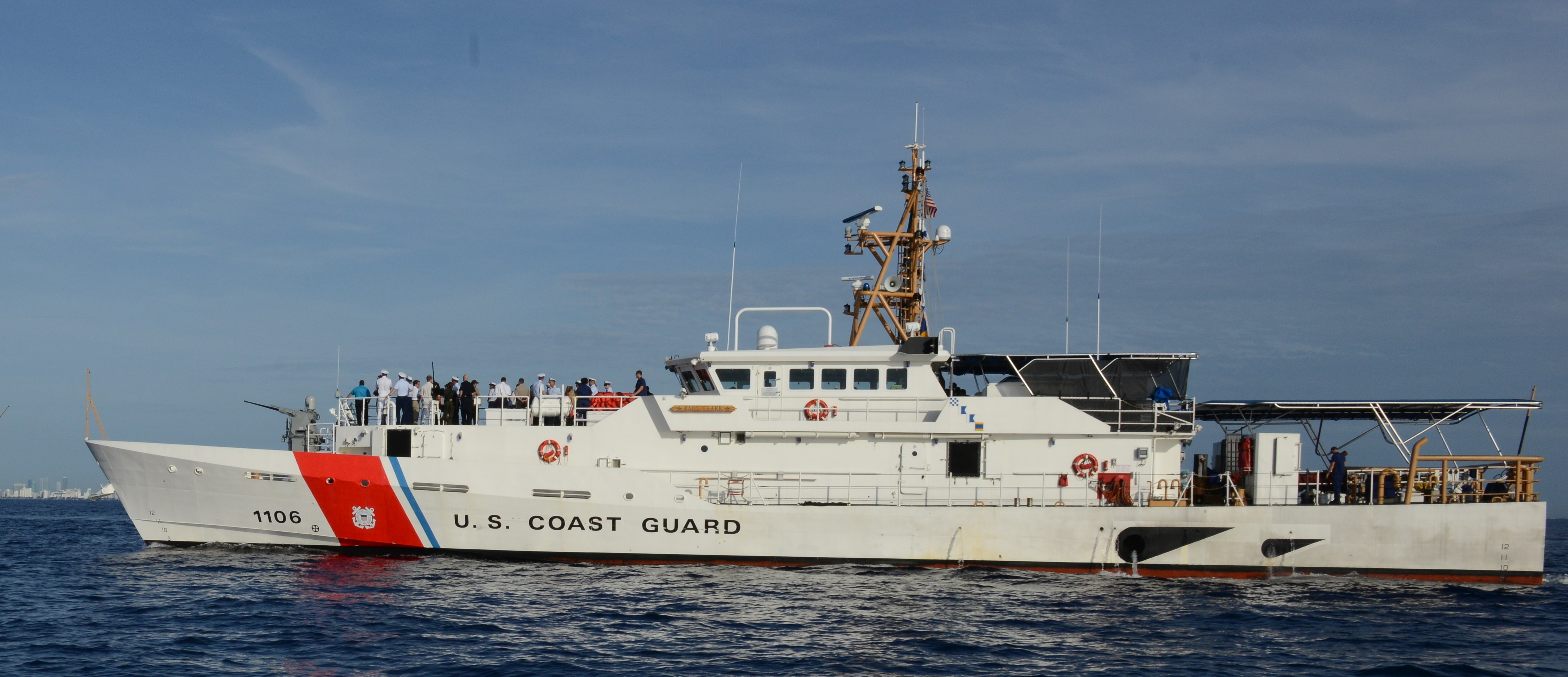 USCGC Paul Clark